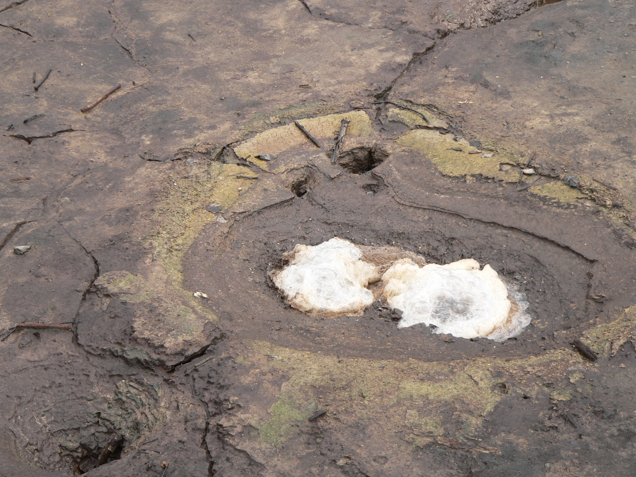 Mofetten, Naturreservat Soos, Tschechische Republik